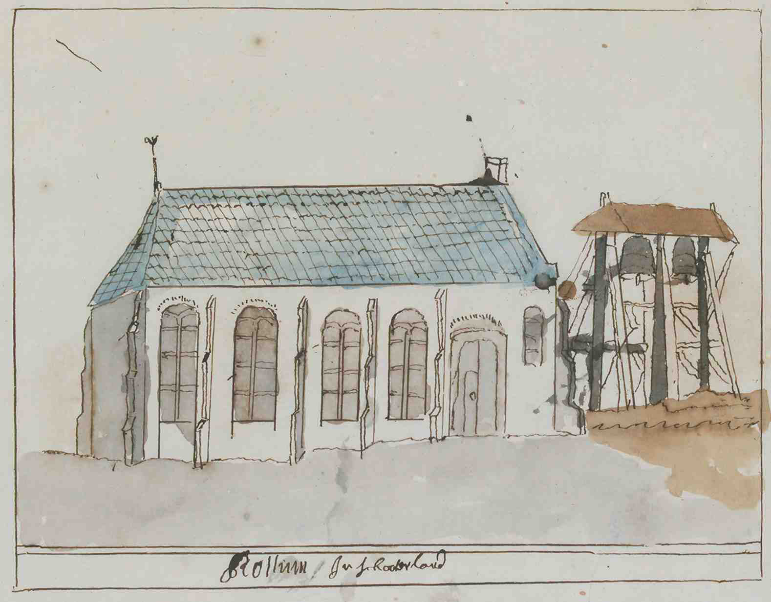 Korte Beschreijving van de Steden Dorpen Gehugten en Heeren-huizen der Heerlykheid Vriesland Benevens Desselfs Afbeeldingen Meest na 't leven getekent By een Vergaderdt Door Andries Schoemaker